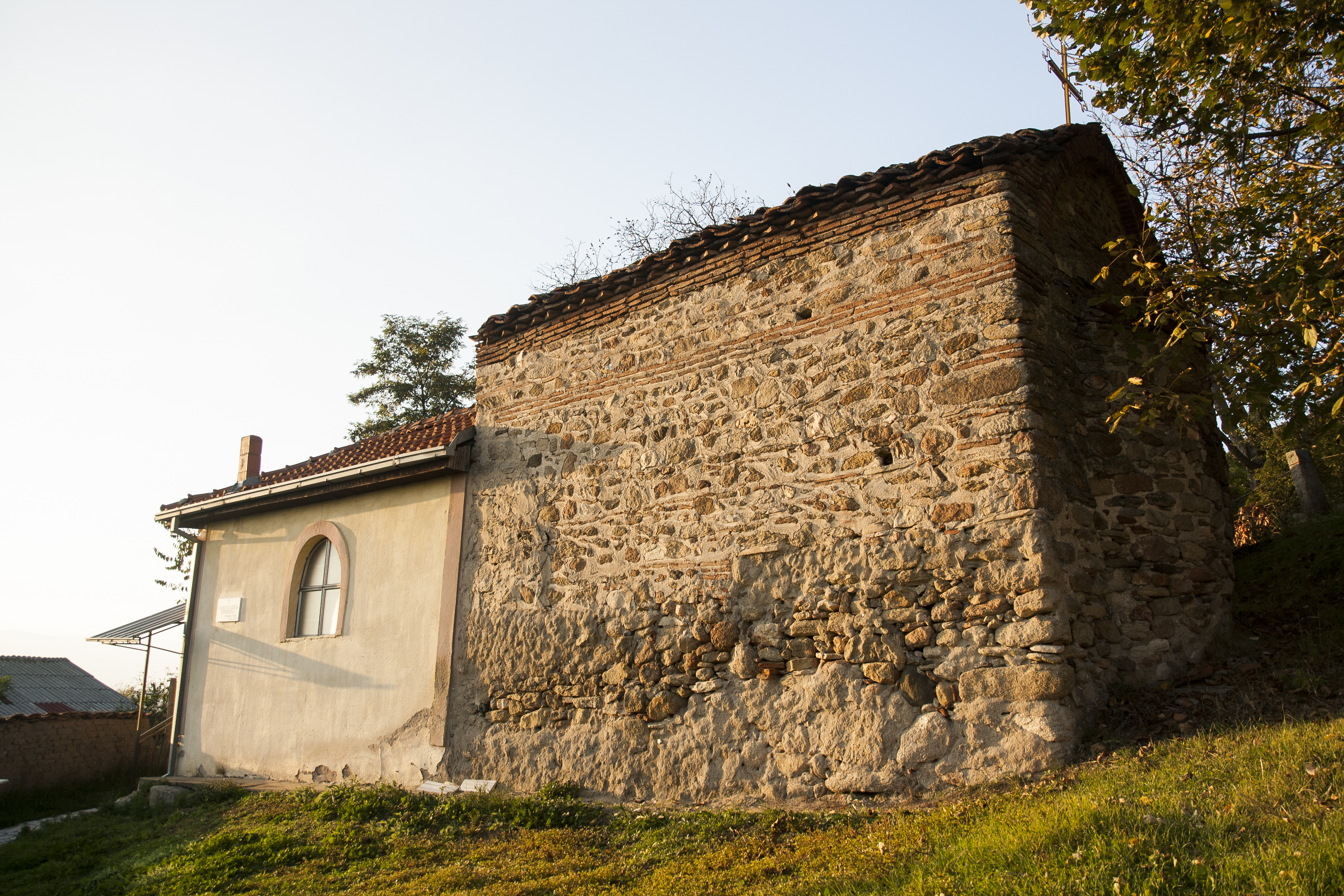 Црква “Св. Богородица Пречиста“